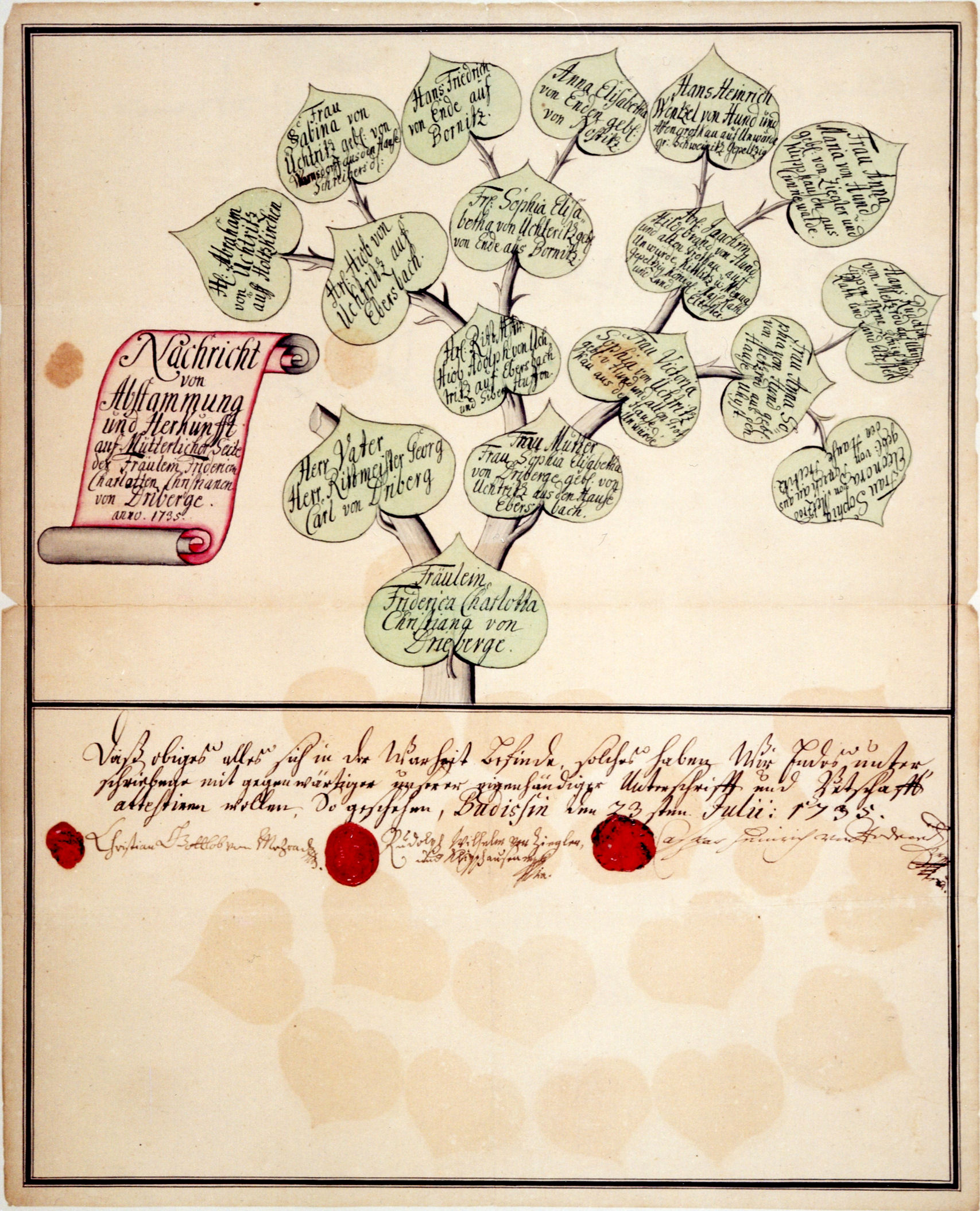 Ahnentafel 1735 Friederica Charlotta Christina von Drieberg, eingereicht beim Kloster Dobbertin